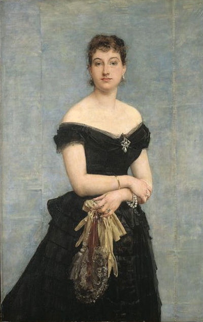 Madame Louis Singer, née Thérèse Stern (1859-1935)